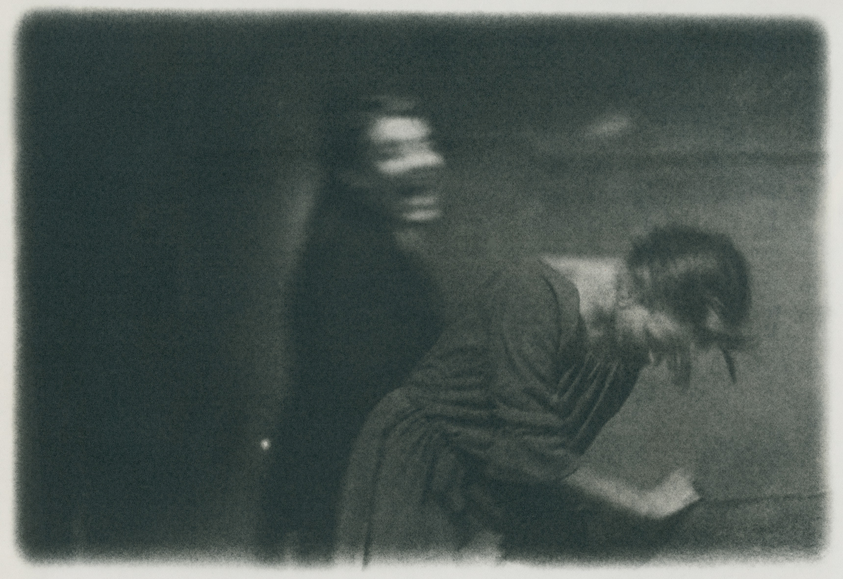 Footografie z divadelního představení Divadlo na zábradlí Bratři Karamazovi (režie Evald Schorm)